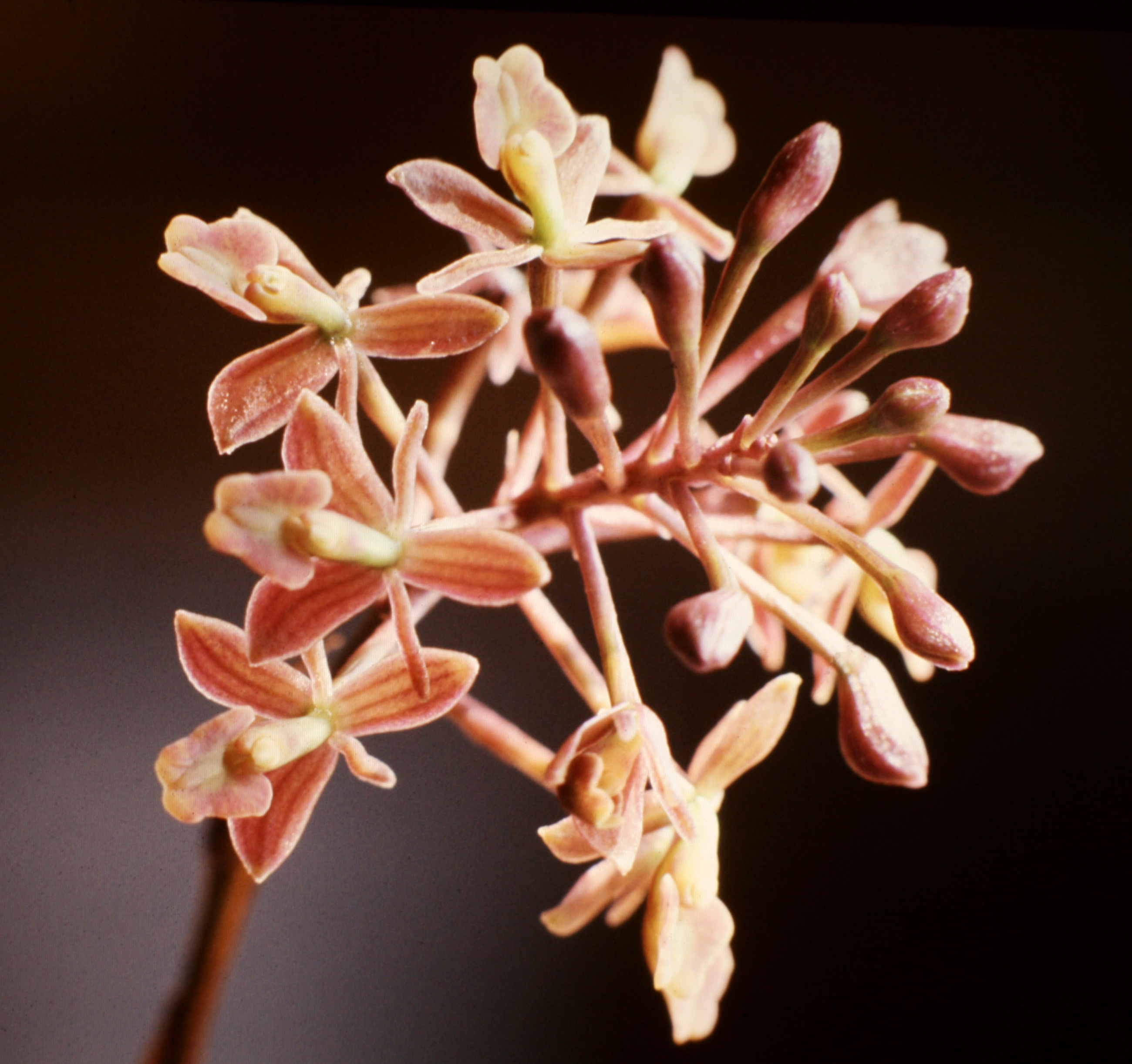 Epidendrum anceps, Suriname.